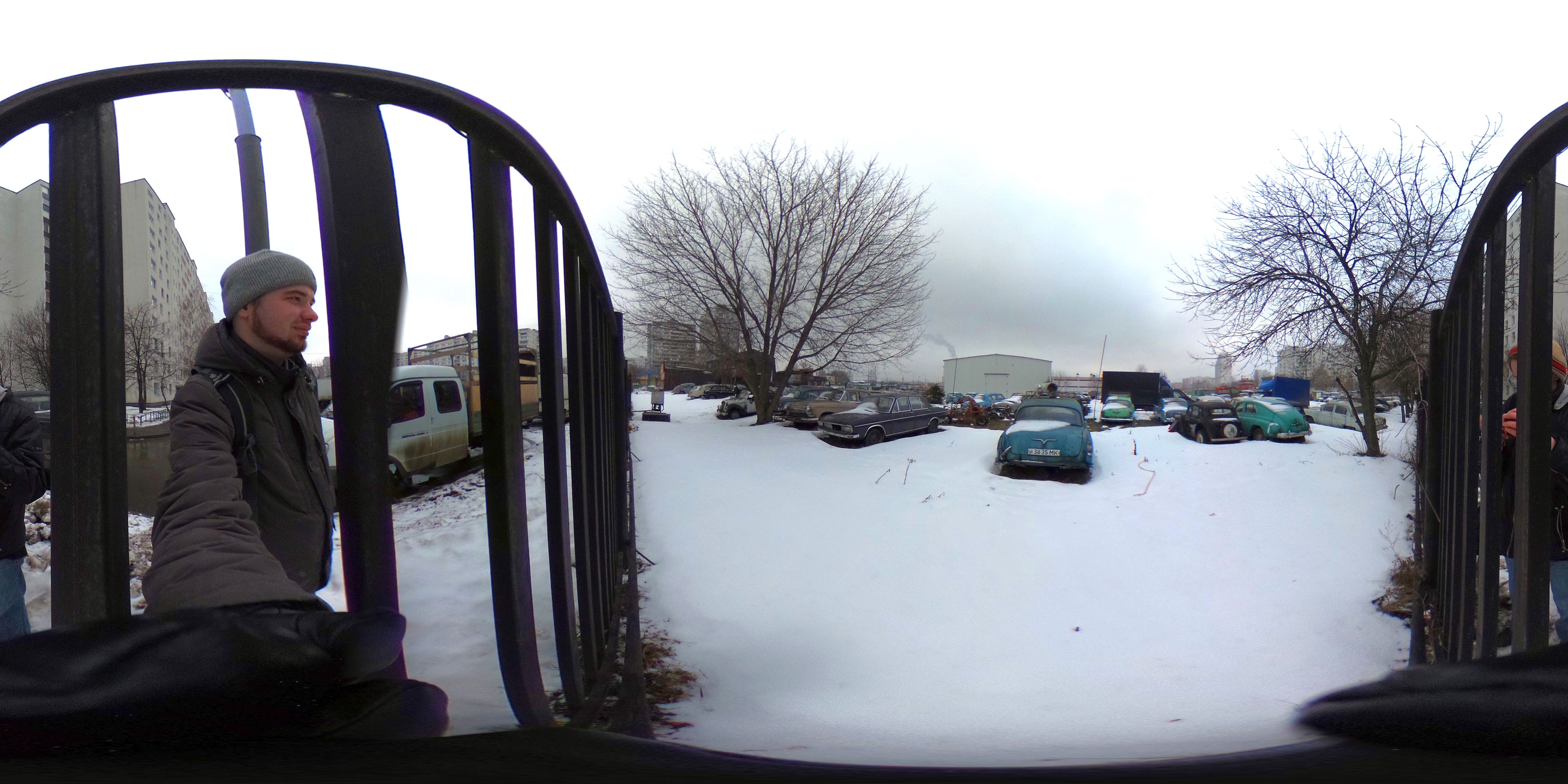 Moscow, Lomakov auto museum, Lublino